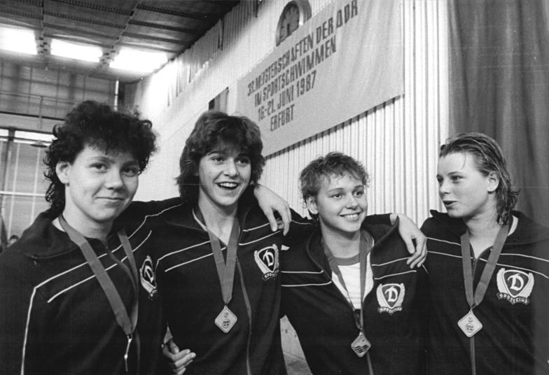 Jessika Reim, Katrin Meißner, Manuela Stellmach, Kerstin Kielgaß ADN-ZB Kasper 16.6.87 Erfurt: 33. DDR-Meisterschaften im Sportschwimmen- Mit der DDR-Bestleistung von 8:14,48 min in der 4x 200-m-Freistilstaffel gewannen die Mädchen vom SC Dynamo Berlin den Titel. V.l.: Jessika Reim, Katrin Meißner, Manuela Stellmach und Kerstin Kielgaß.